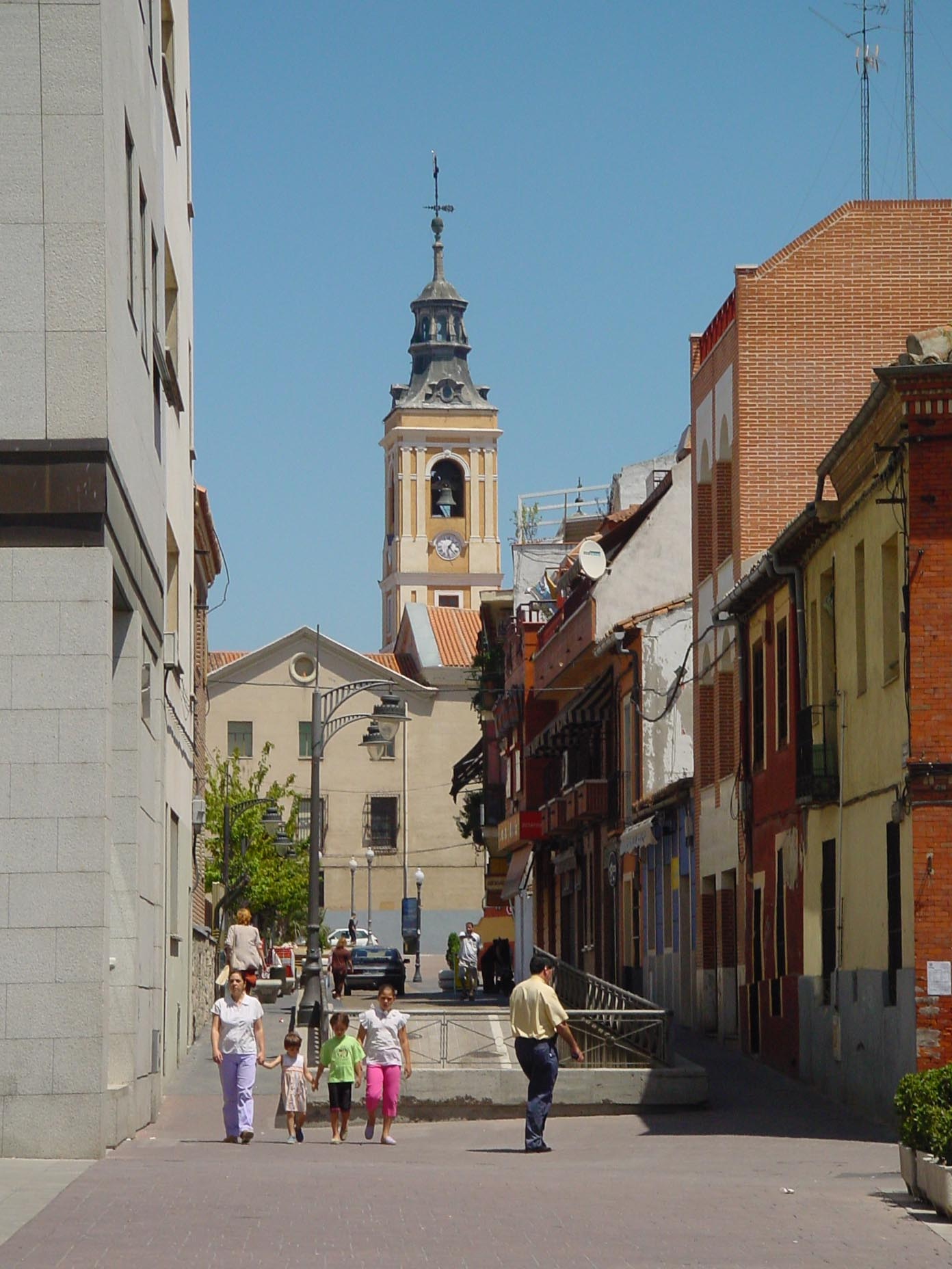 Calle con campanario de iglesia al fondo en Getafe.